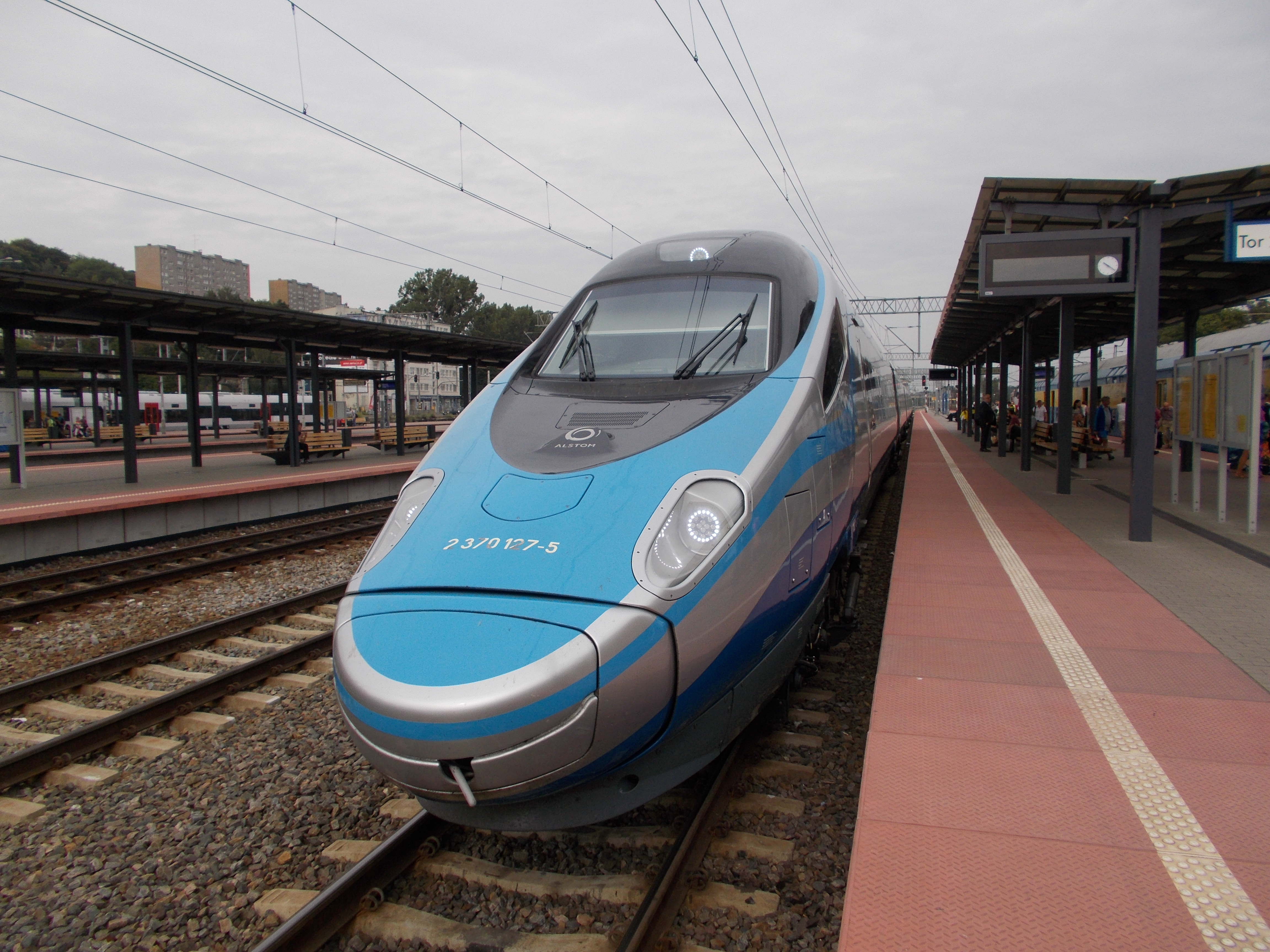 Stacja Gdynia Główna